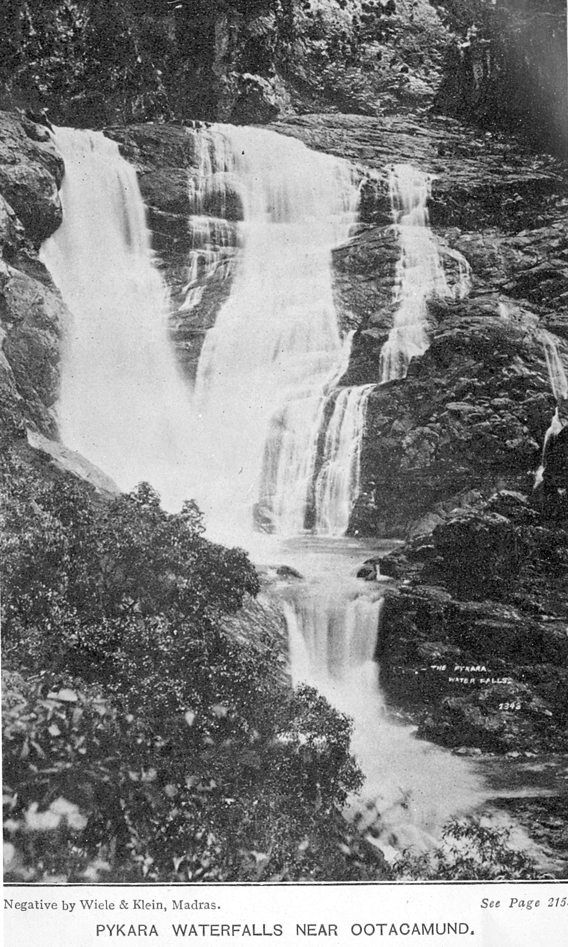 Ootacamund Pykara Waterfalls